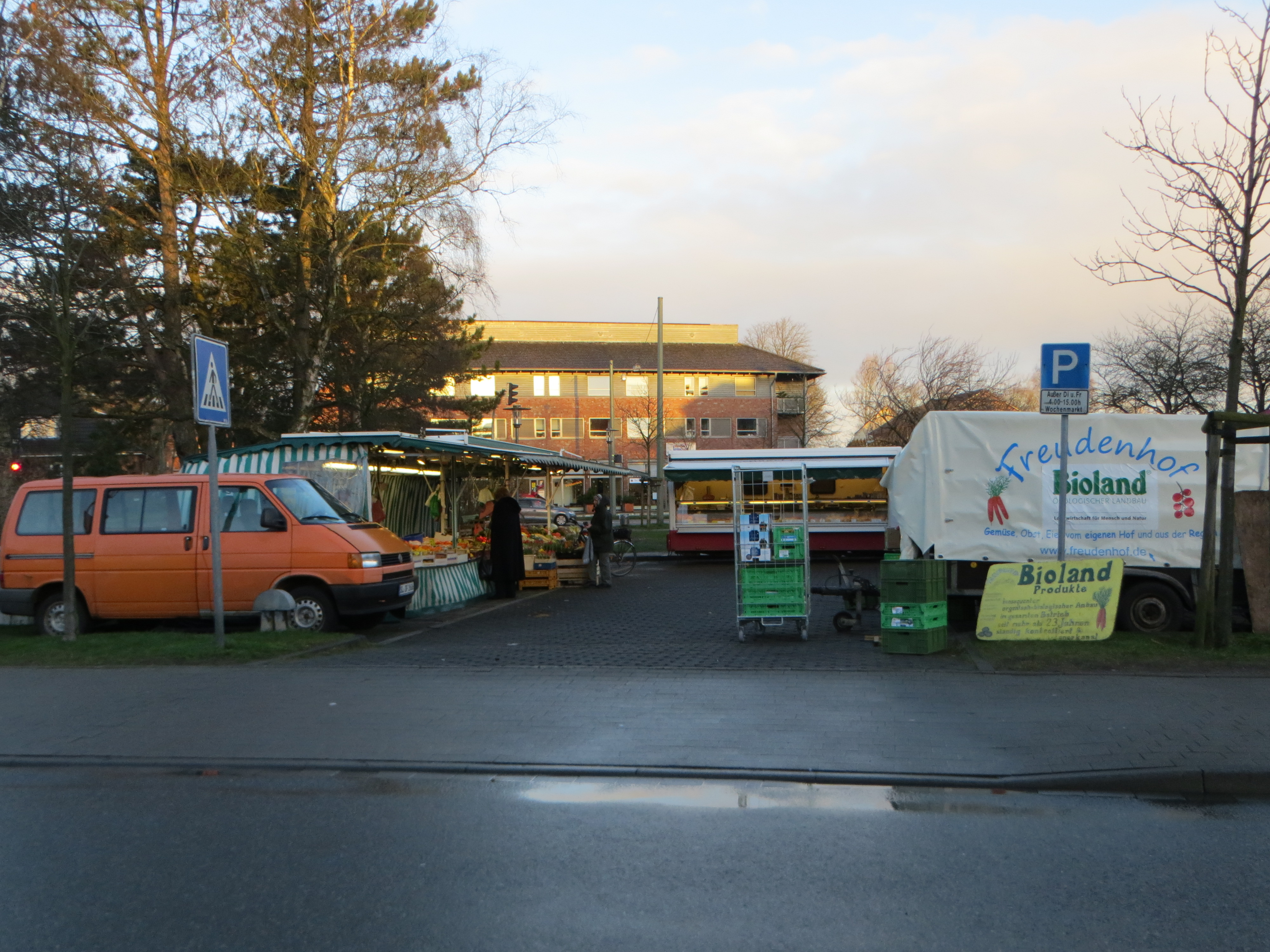 Wochenmarkt auf dem Twedter Plack (Flensburg-Mürwik, Oktober 2014), Bild 04